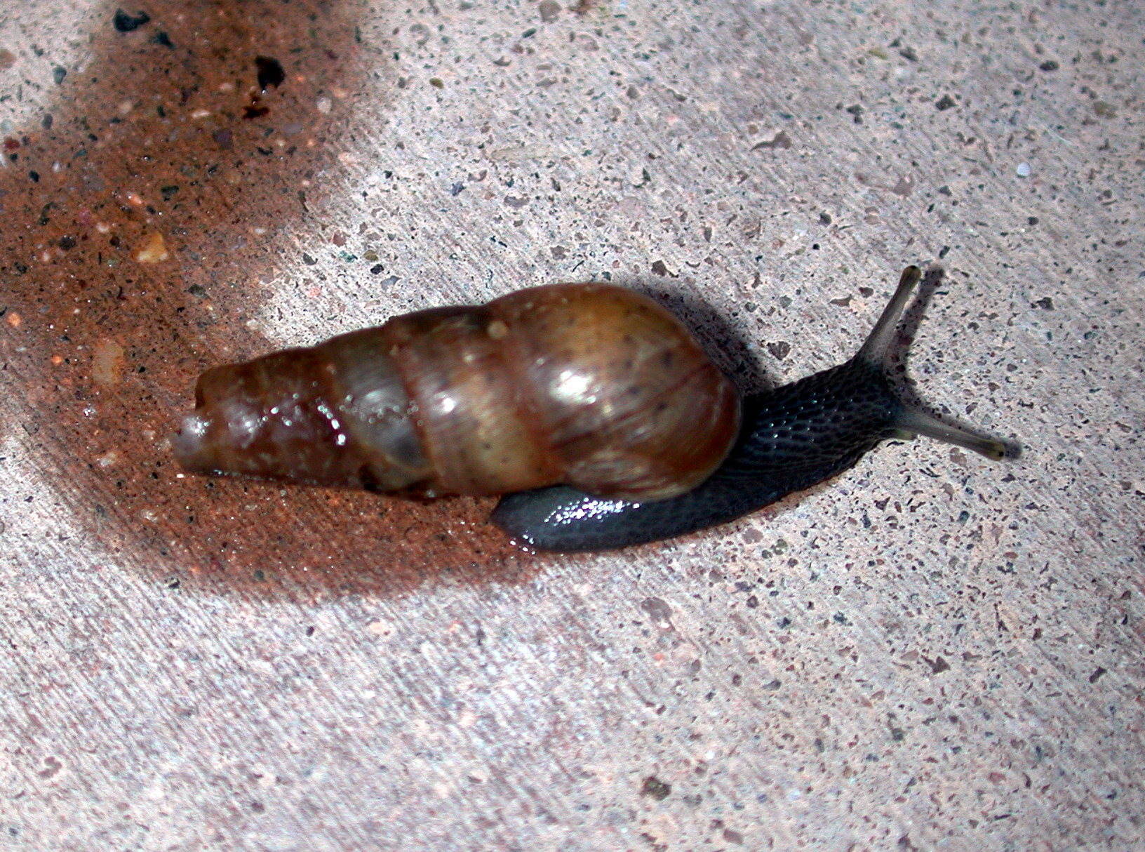 Rumina decollata, predatory decollate snail. Image taken in Phoenix, Arizona, USA.